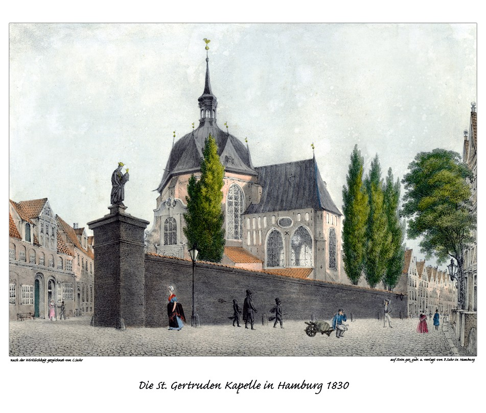 Die St. Gertruden Kapelle in Hamburg 1830, gezeichnet von Christoffer Suhr, Litho von Peter Suhr